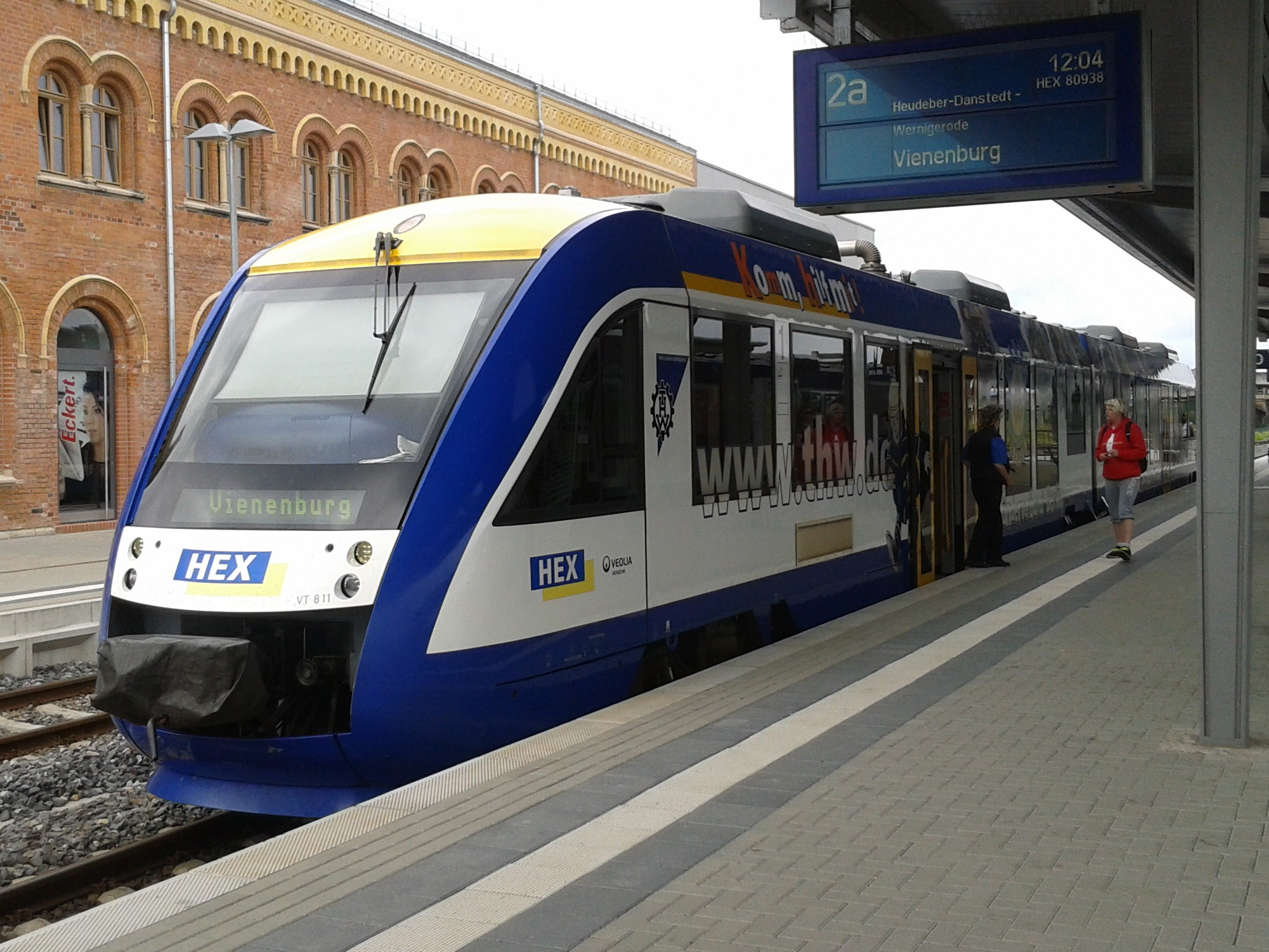 Dieseltriebwagen VT 811 der Veolia Verkehr Sachsen-Anhalt GmbH. Bauart: Alstom Coradia LINT 41, Baujahr:2005, Fabriknummer: 01001368012